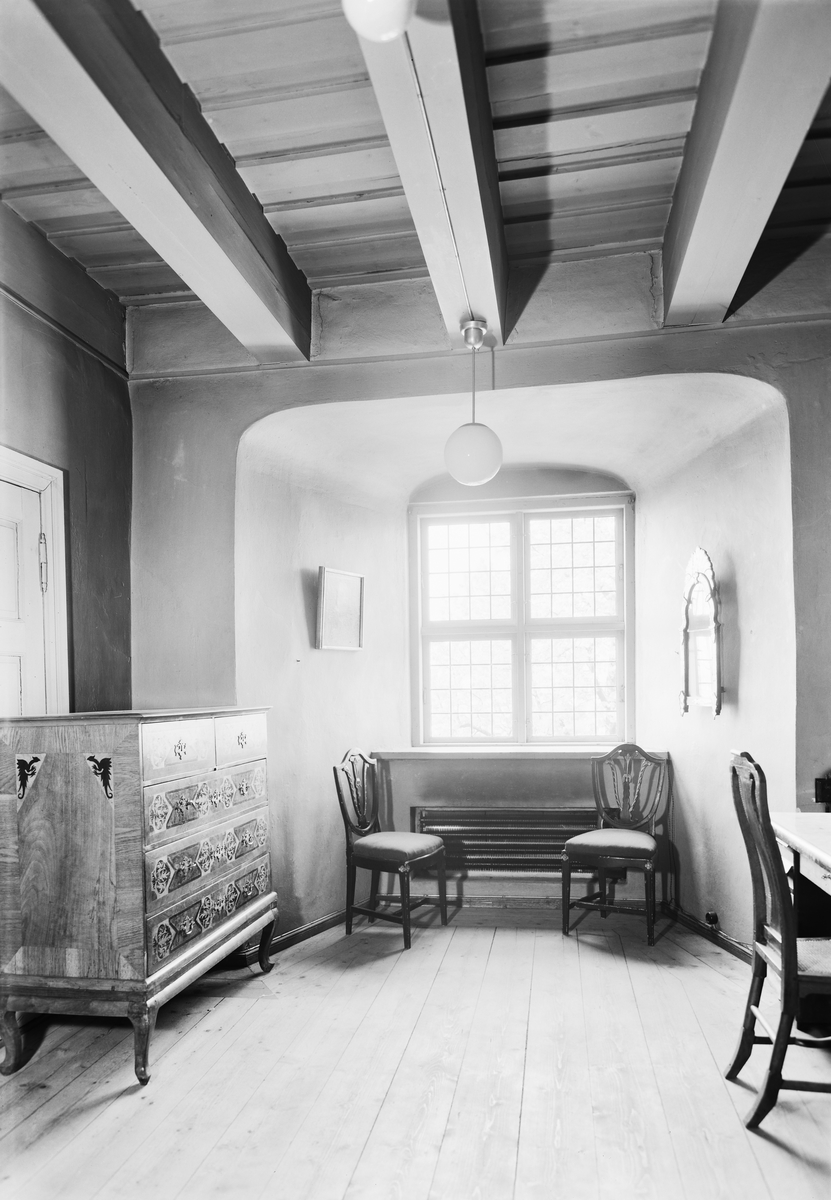 Henrik Wergelands arbeidsrom på Akershus. Riksarkivarlokalet.